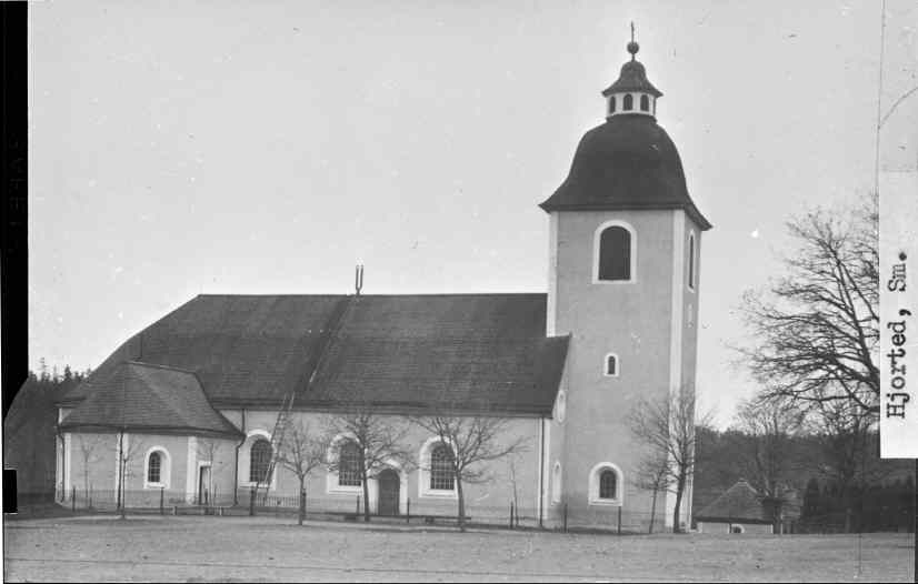 Kyrkan mot norr. Kategori: (01) ExteriörerKyrkan mot norr.